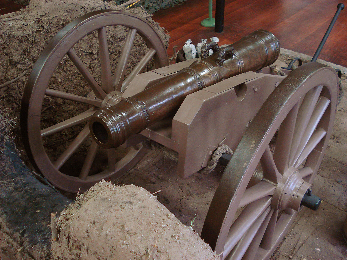 Canhão do Século XVIII, acervo do Museu do Comando Militar do Sul, Porto Alegre, Brasil.